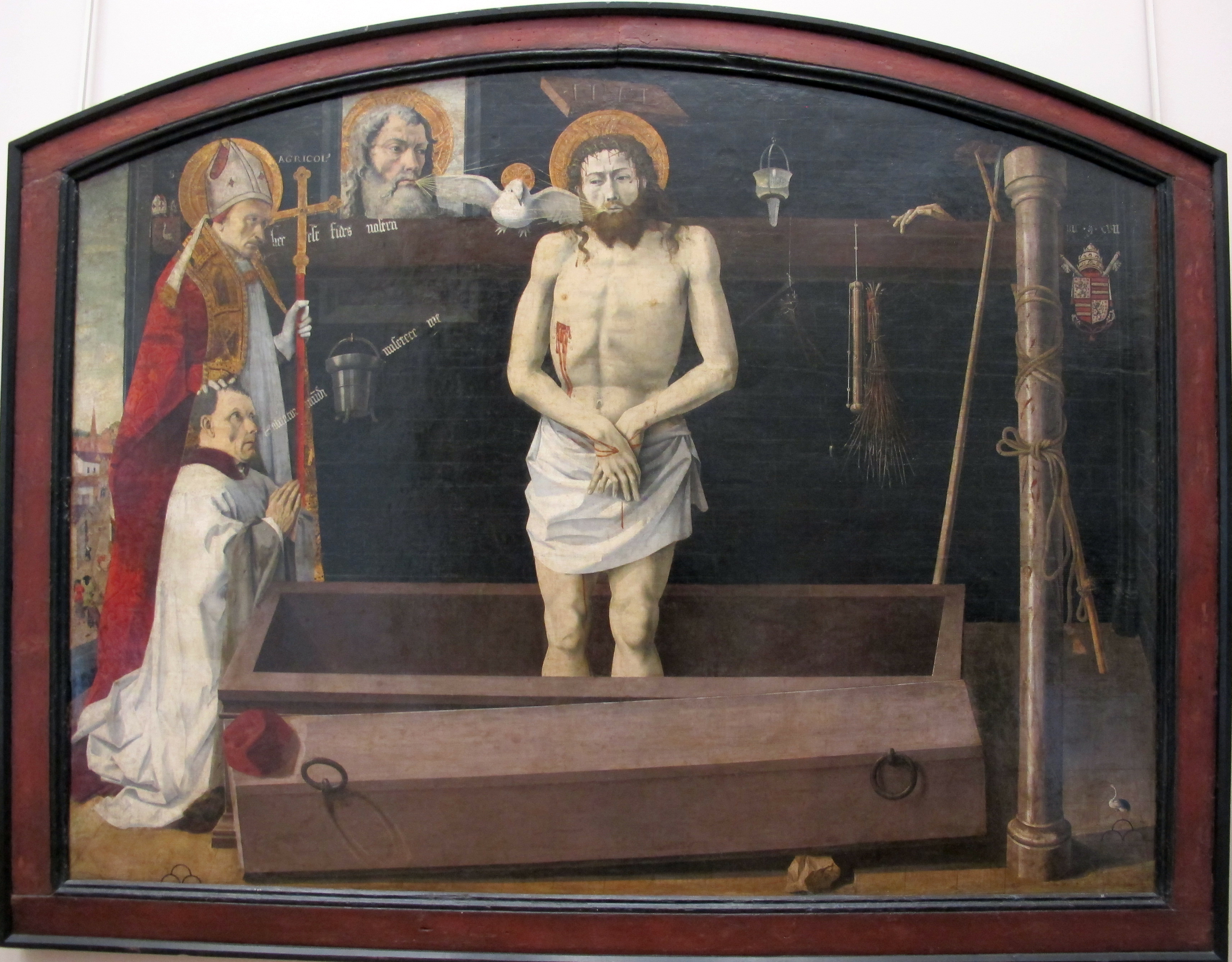 Dipinti francesi nel Louvre, Parigi, secc. XIV-XV